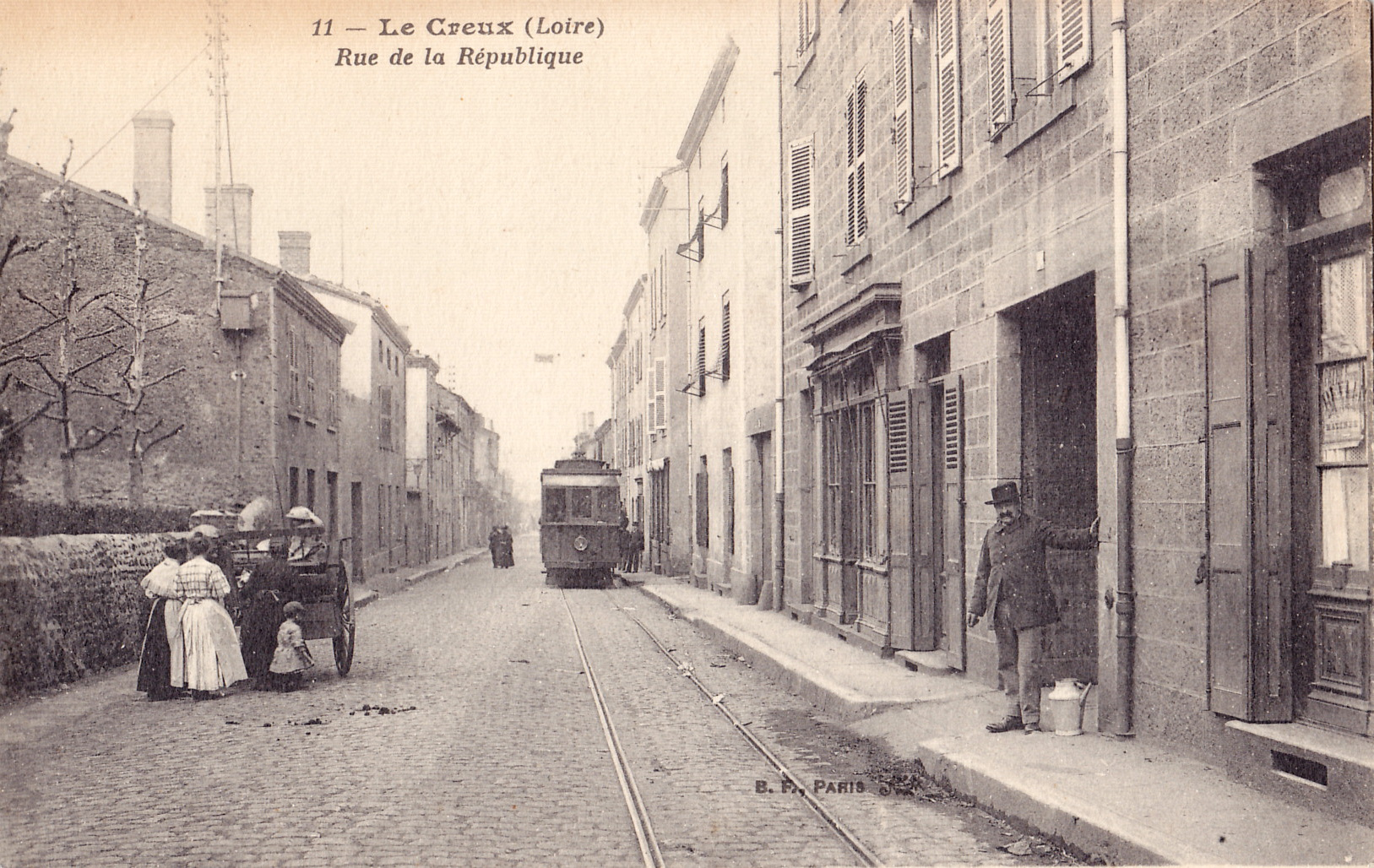 Carte postale ancienne éditée par BF à Paris, n°11 : LE CREUX - Rue de la République